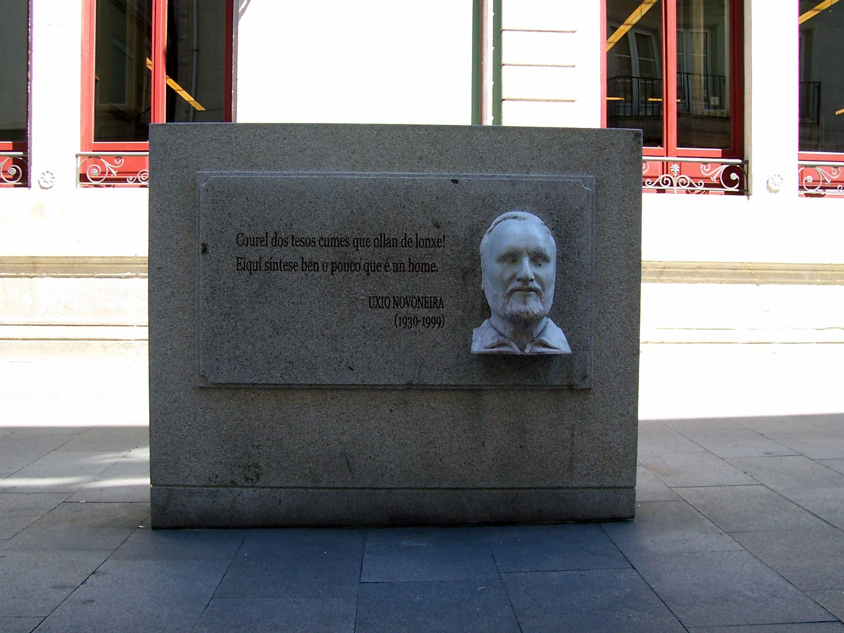 Escultura de Uxío Novoneyra na Praza Maior de Lugo, dunha serie adicada a escritores galegos. Licensing Categoría:Imaxes de Lugo